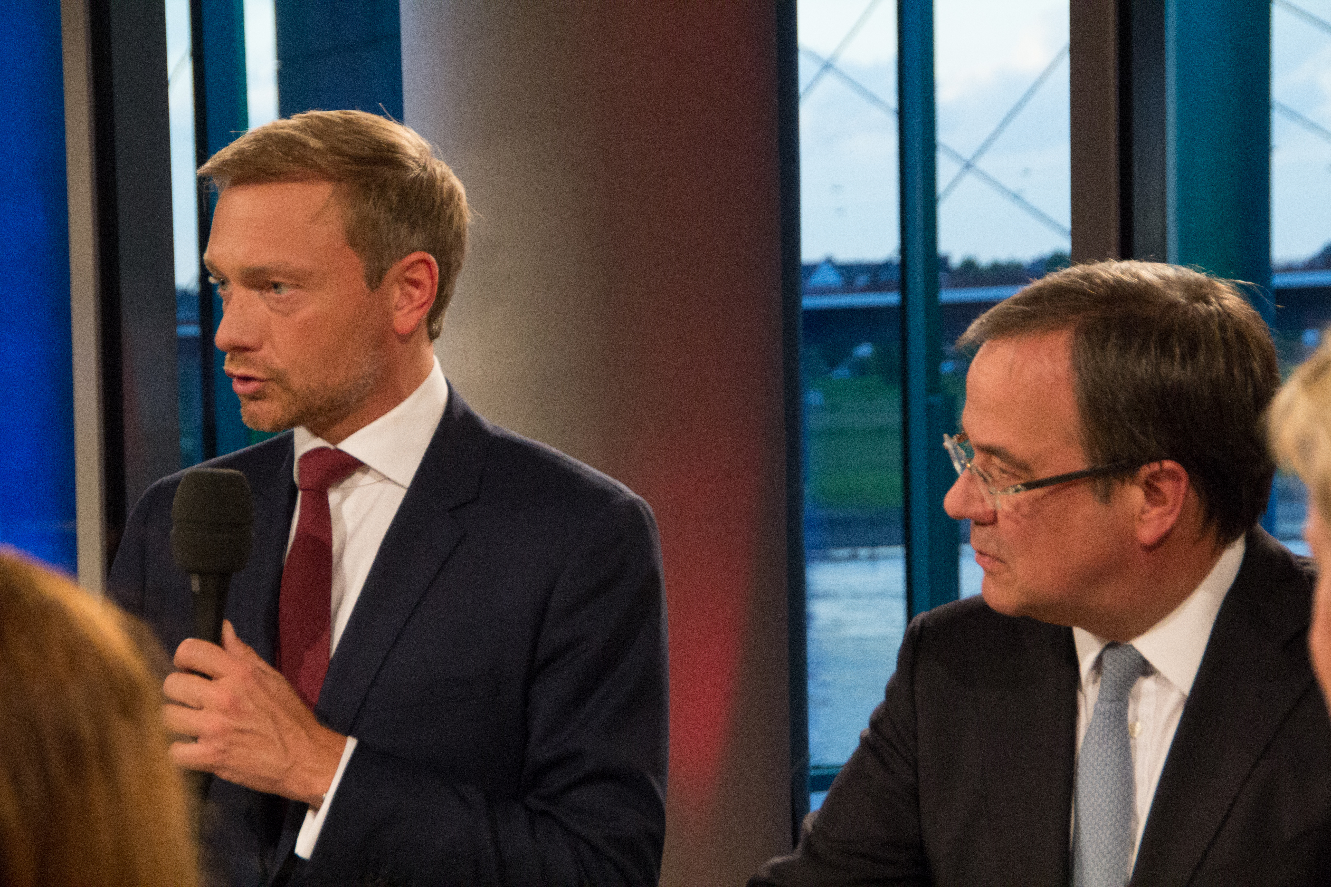 Christian Lindner (FDP) und Armin Laschet (CDU) am Wahlabend der NRW Landtagswahl am 14. Mai 2017 in Düsseldorf